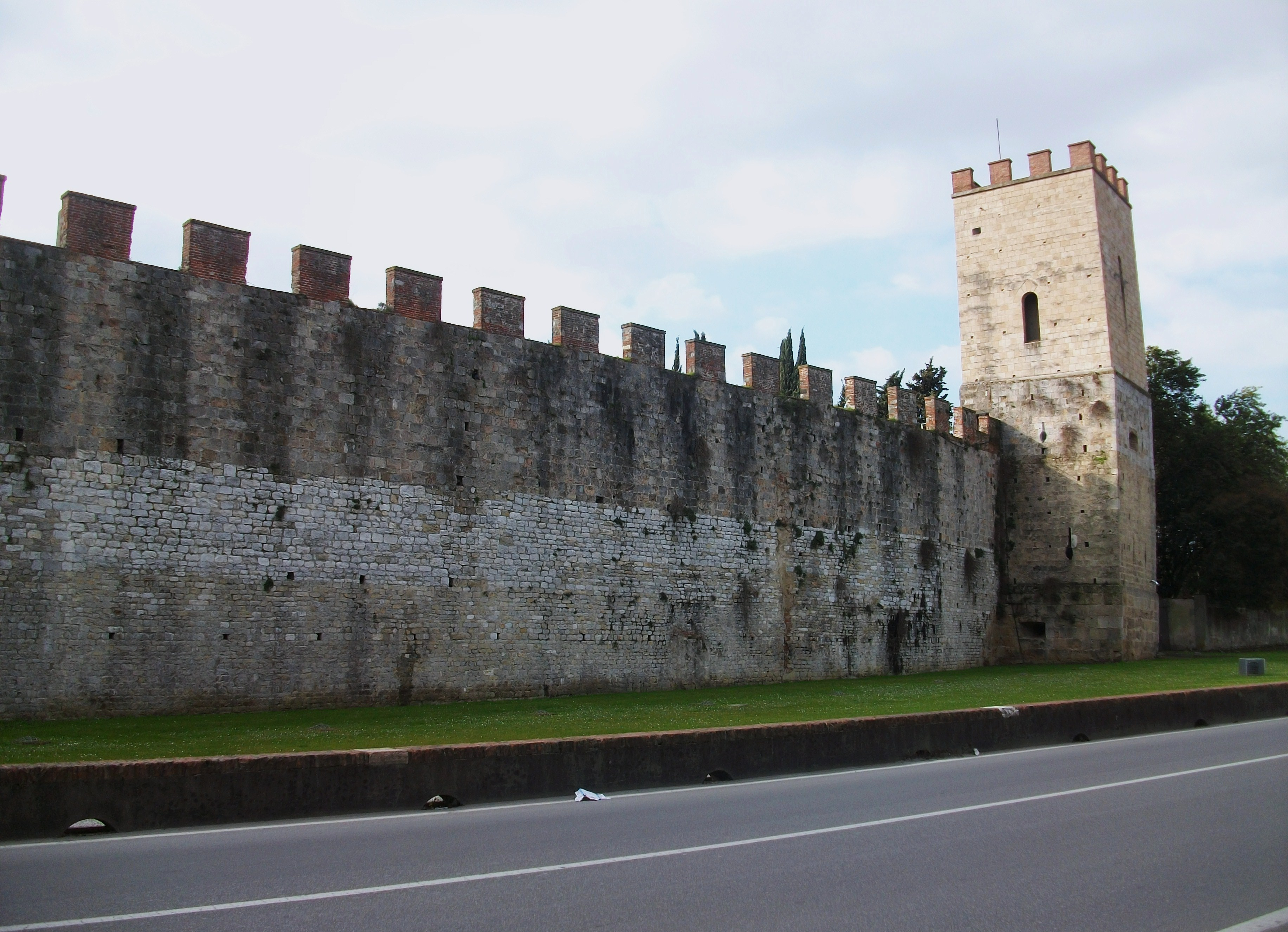 Muralles de Pisa i la torre de Santa Maria.